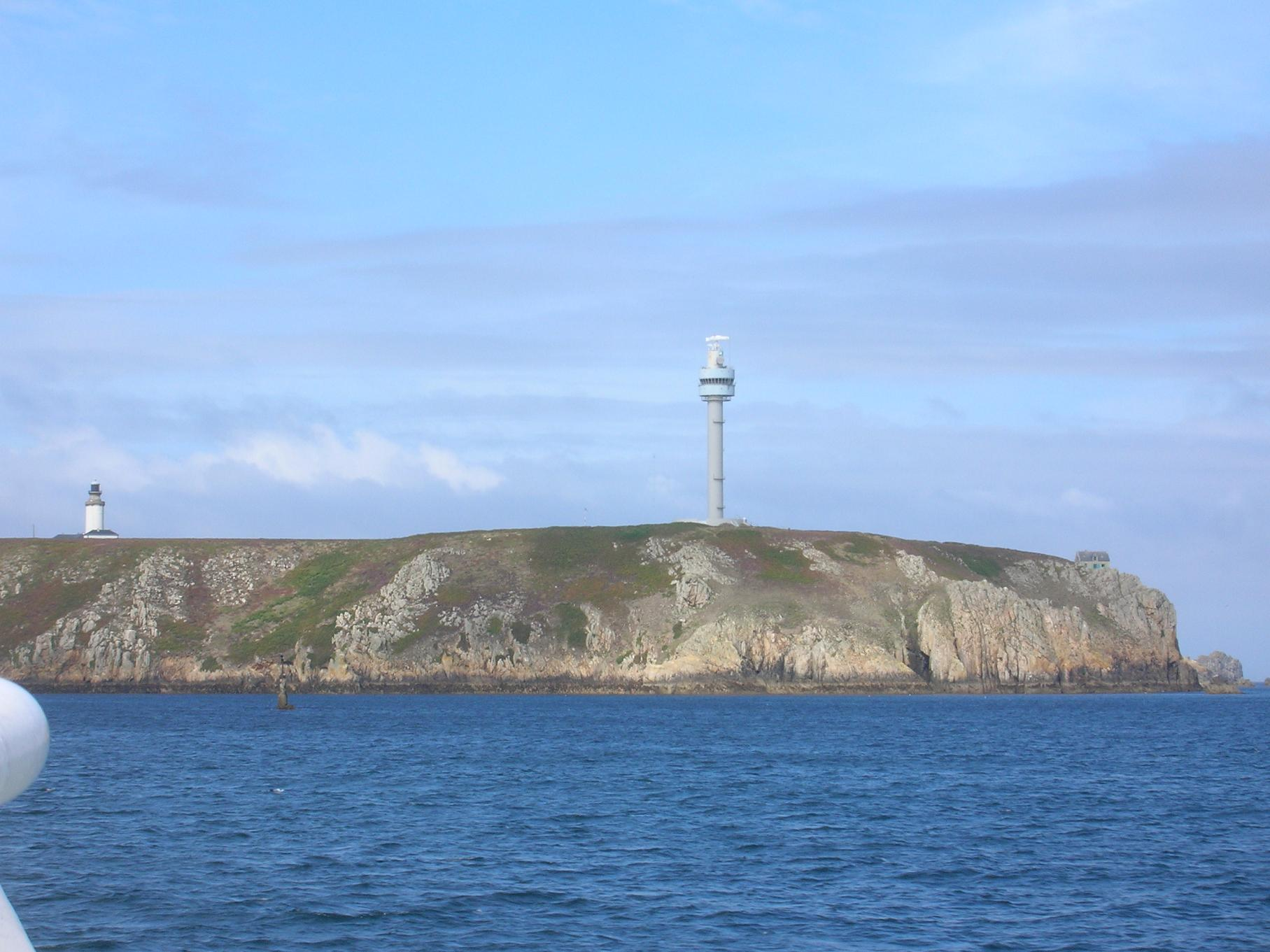 Ouessant - Faro di Stiff (sx) e Torre radar (dx)